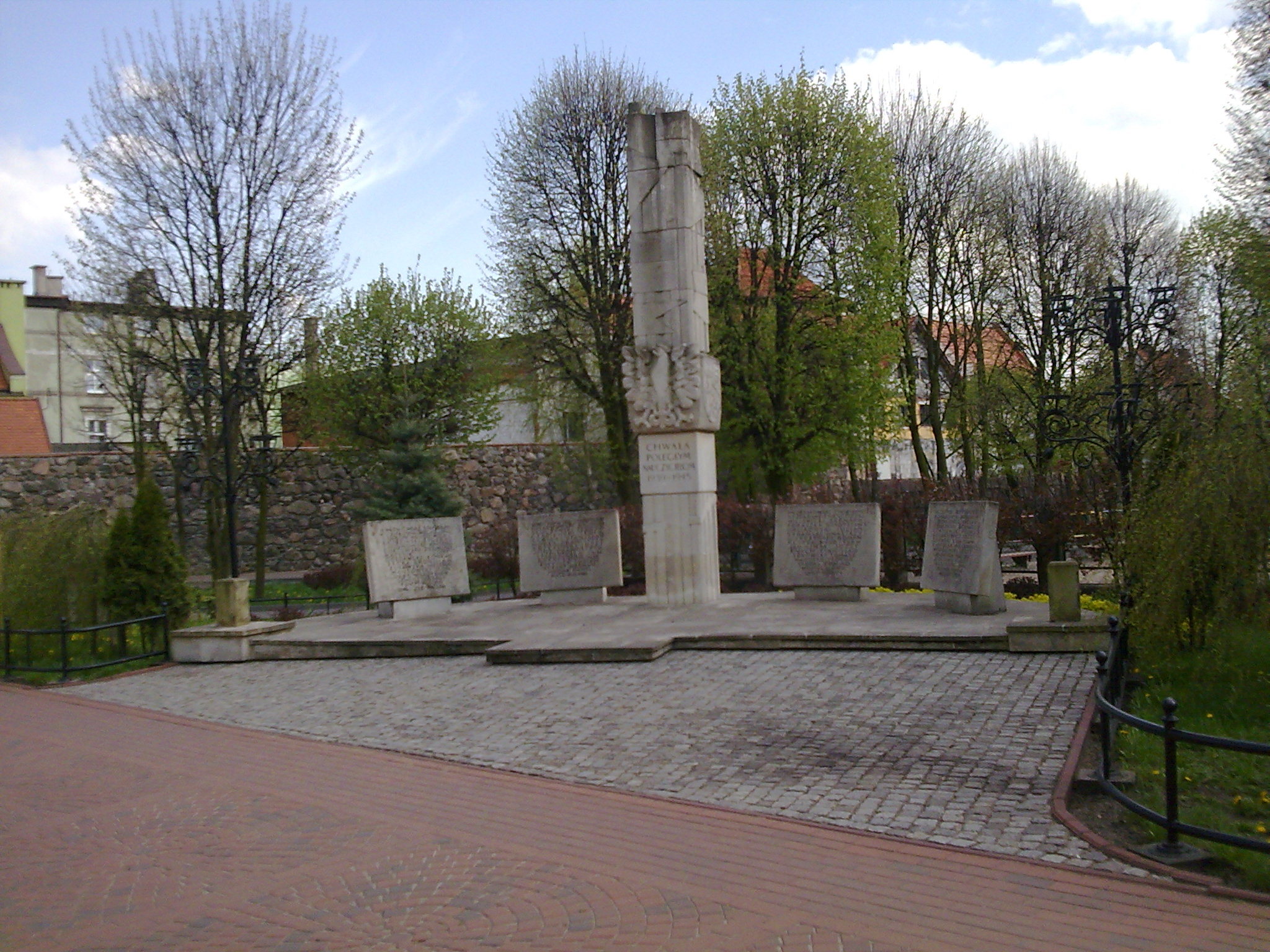 Pomnik przy ulicy 31 Stycznia